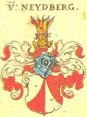 Wappen der Familie von Neuberg nach Siebmachers Wappenbuch